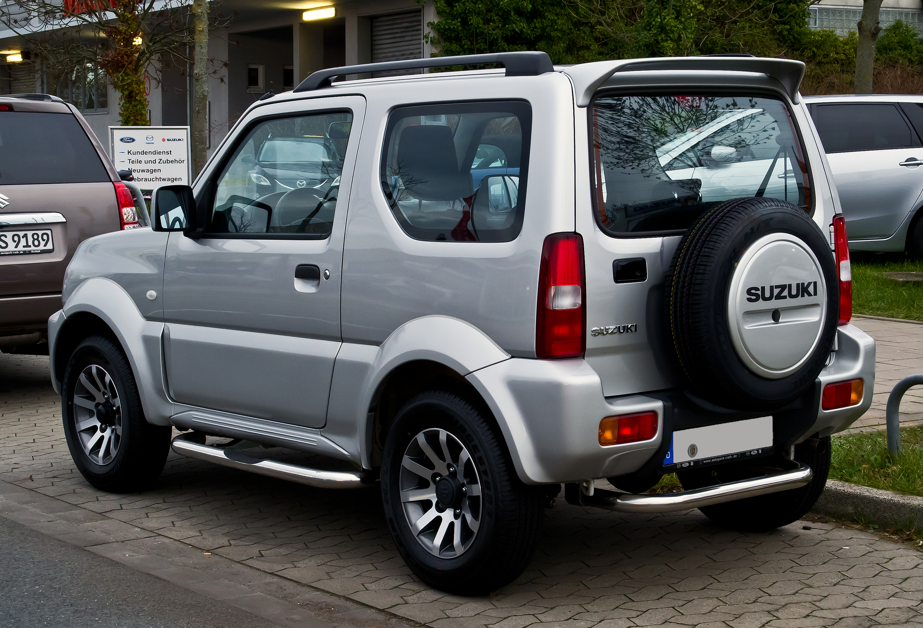 Suzuki Jimny 1.3 Club (2. Facelift)